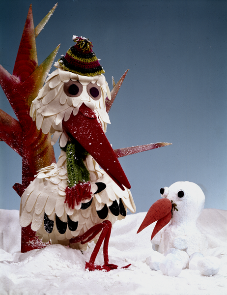 Juffrouw Ooievaar uit De Fabeltjeskrant in de winter